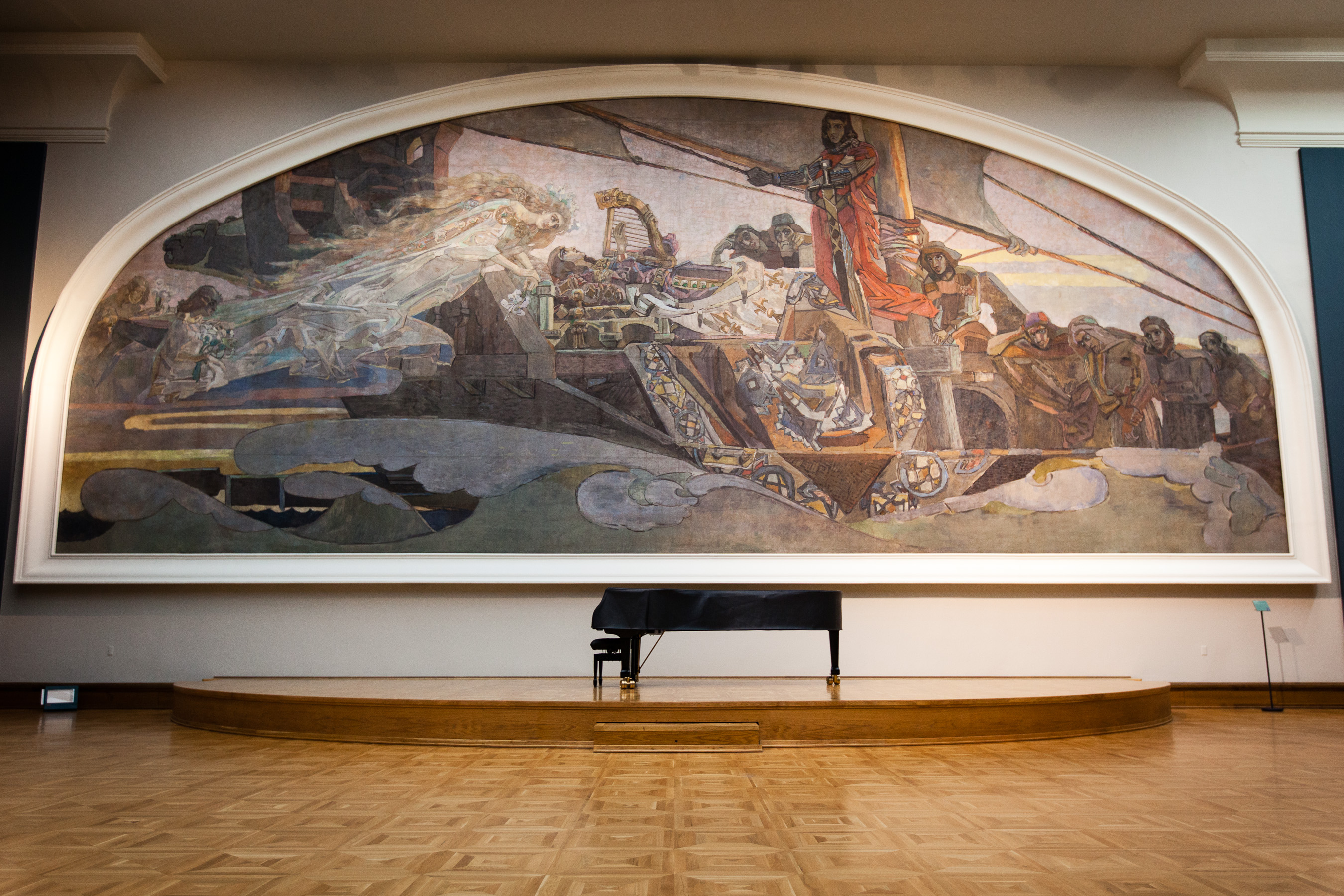 Moscow